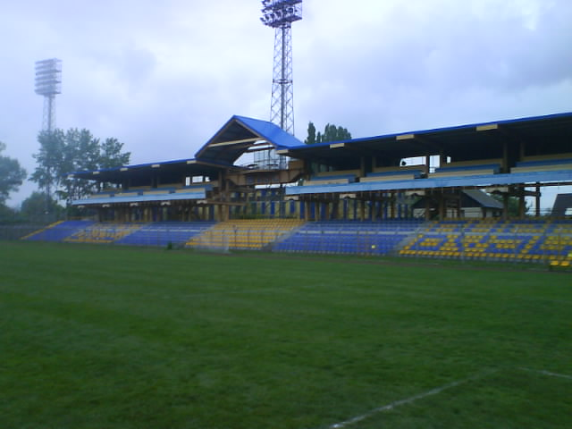 A BVSC focicsapatának Szőnyi uti stadionja.